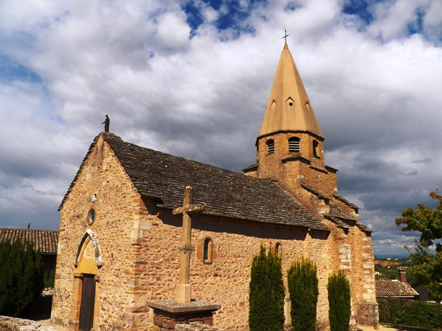 La jolie petite église romane de Saint Vérand